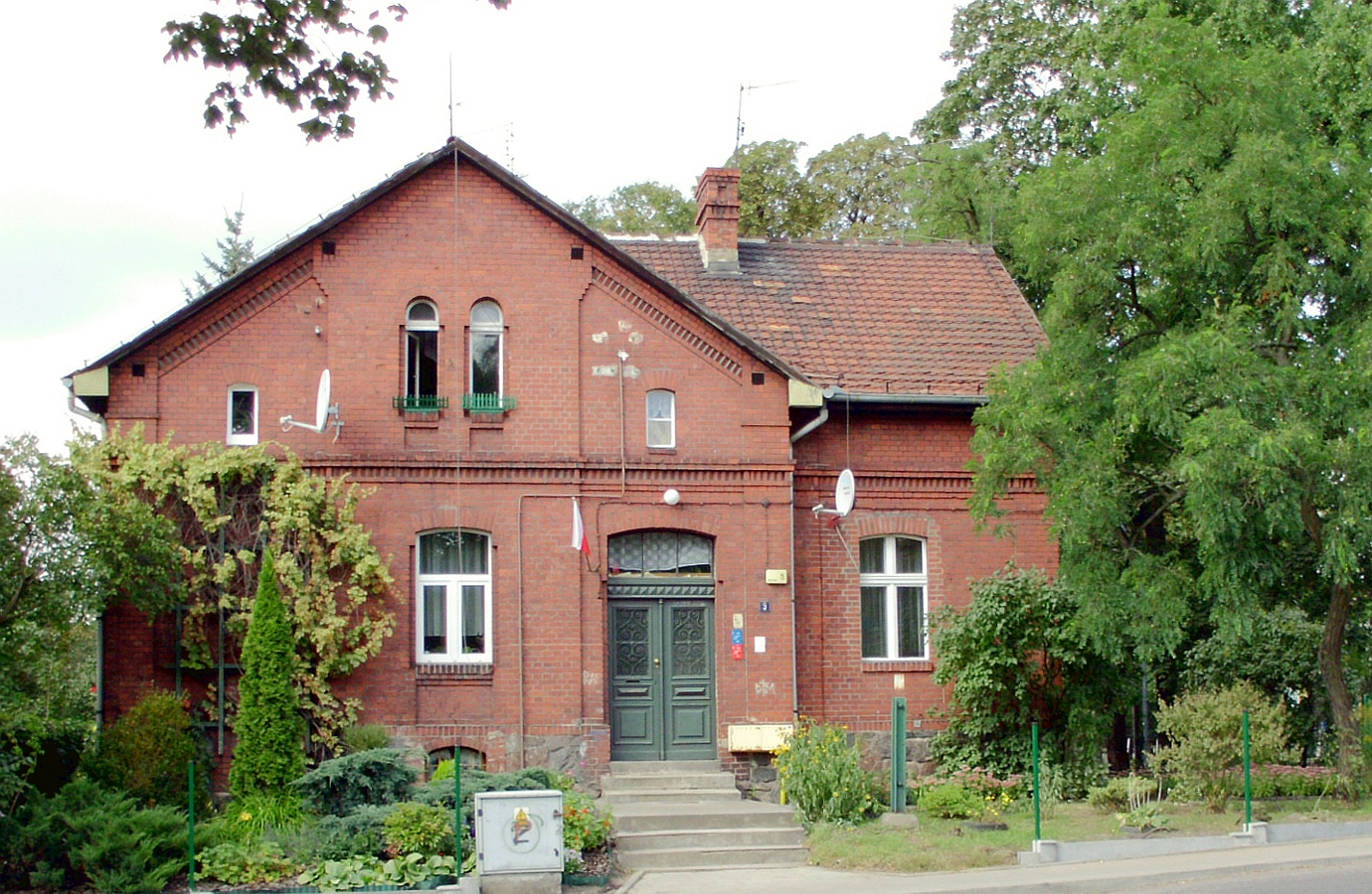 Śluza nr.IV na Starym Kanale Bydgoskim , Bydgoszcz ul.Wrocławska 5 - dom śluzowego